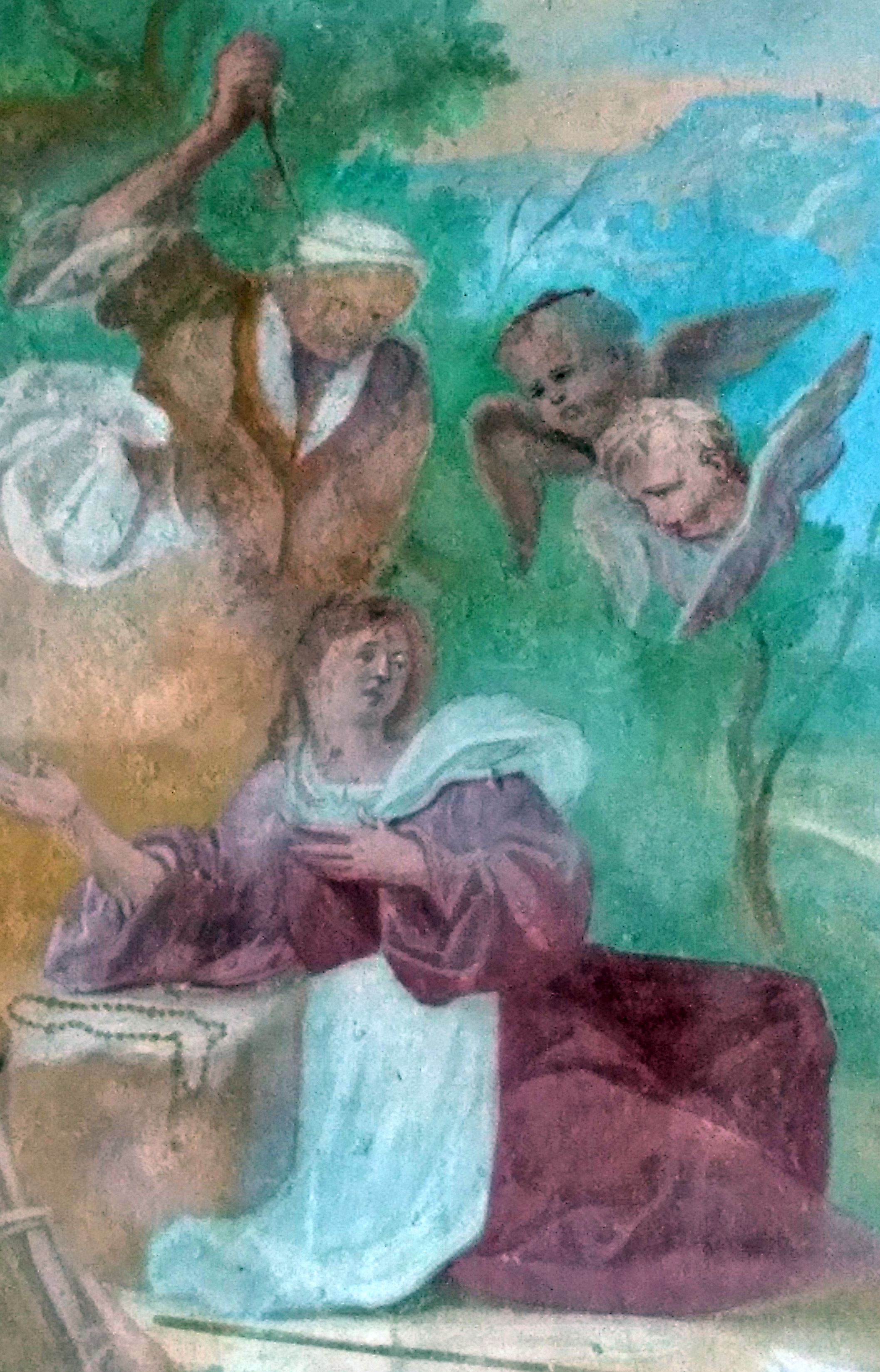 Santuario della Beata Panacea al Monte (Quarona, VC) affresco sula facciata